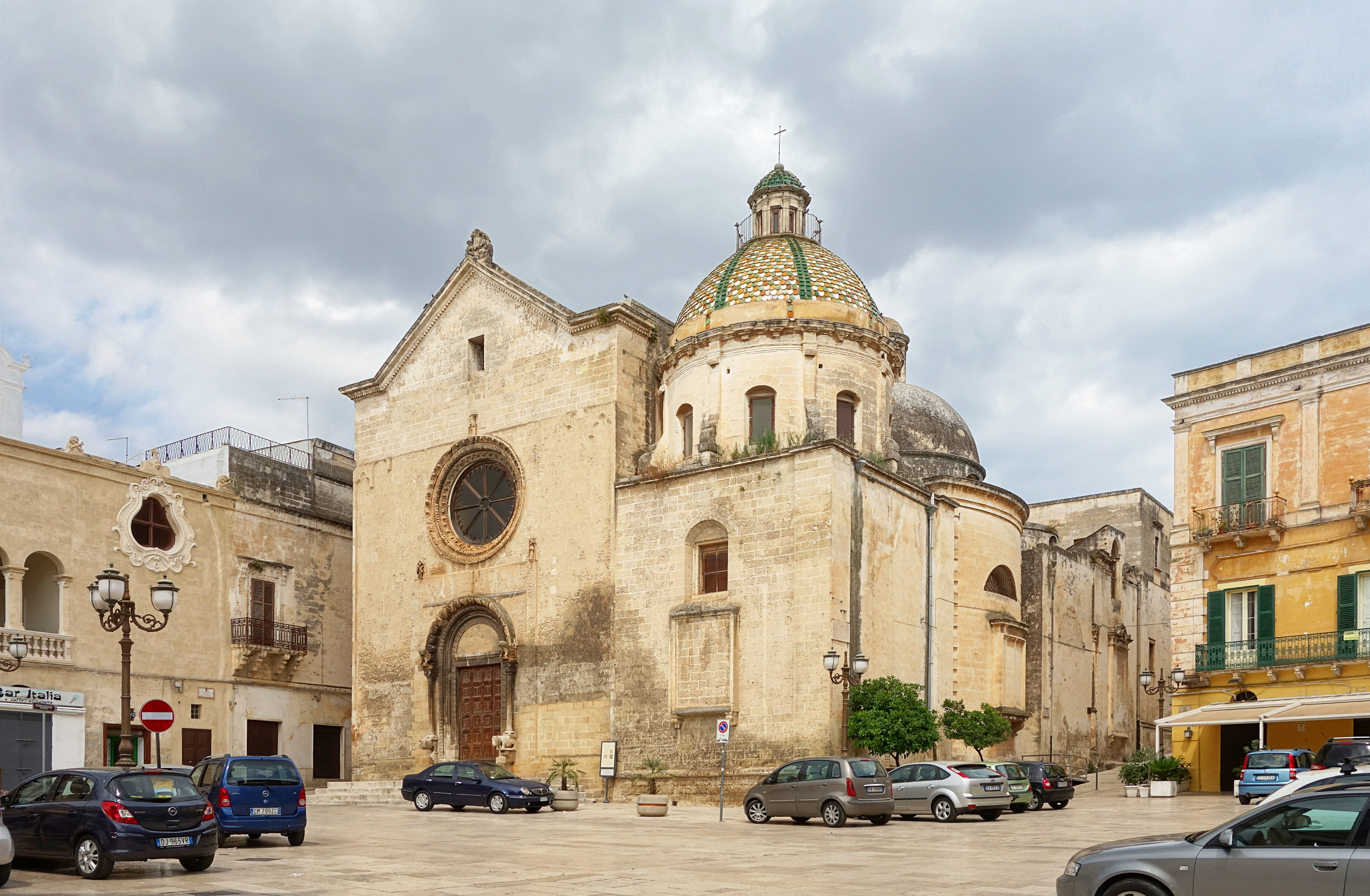 La chiesa Madre de Grottaglie, Italie.